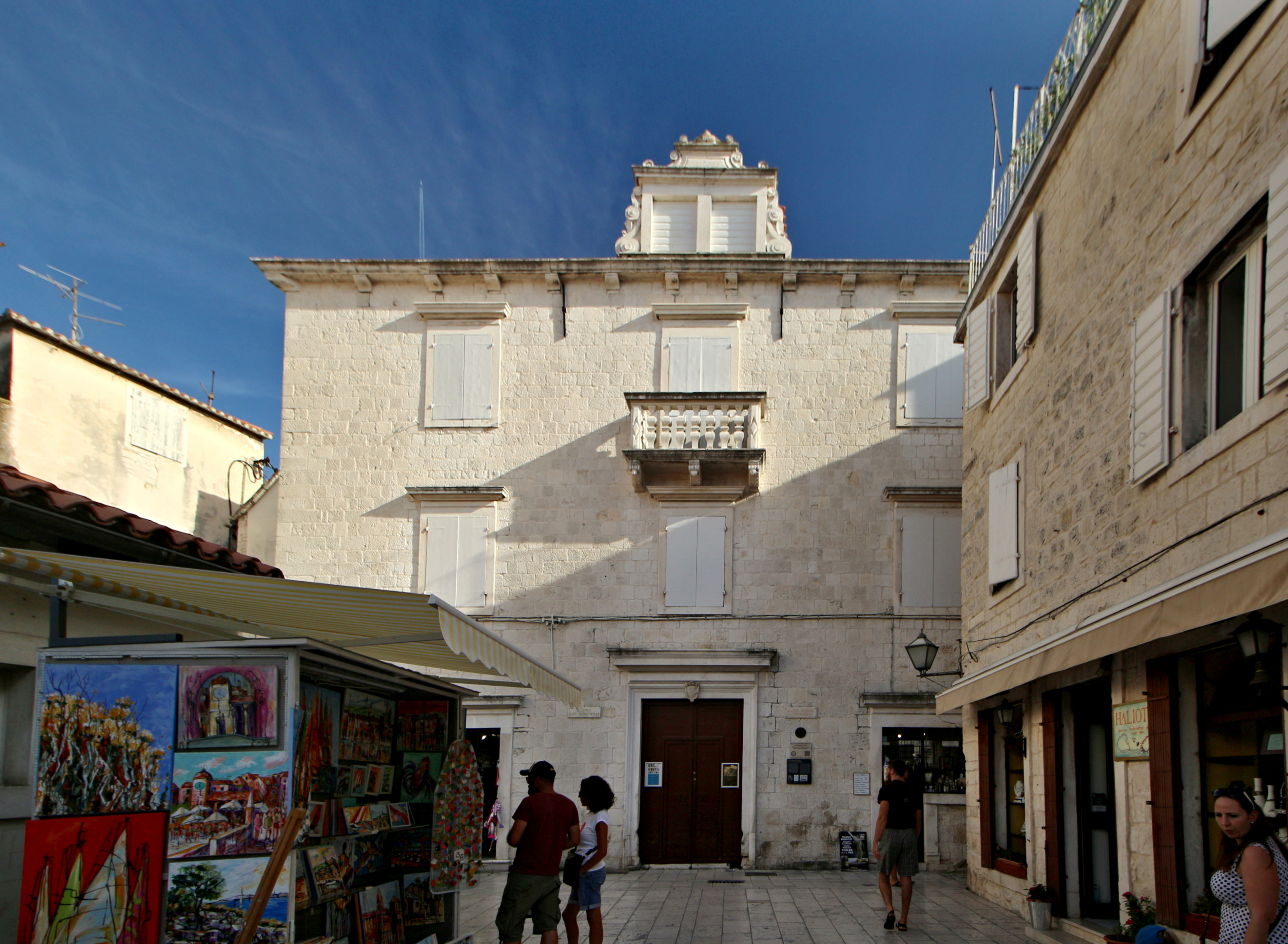 Trogirský palác Garagnin Fanfogna, Městské muzeum